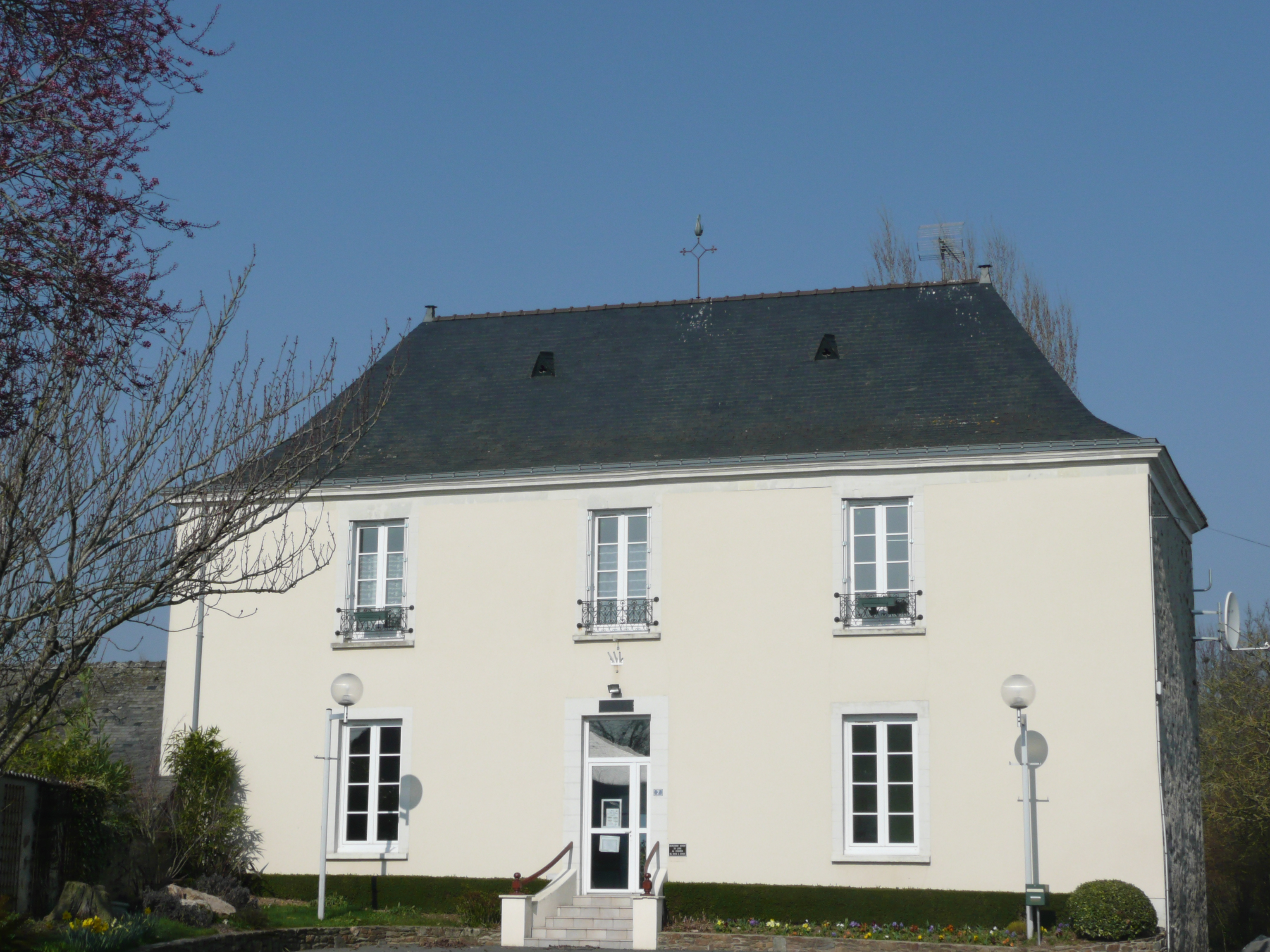 Mairie du Tremblay, dans le Maine-et-Loire.